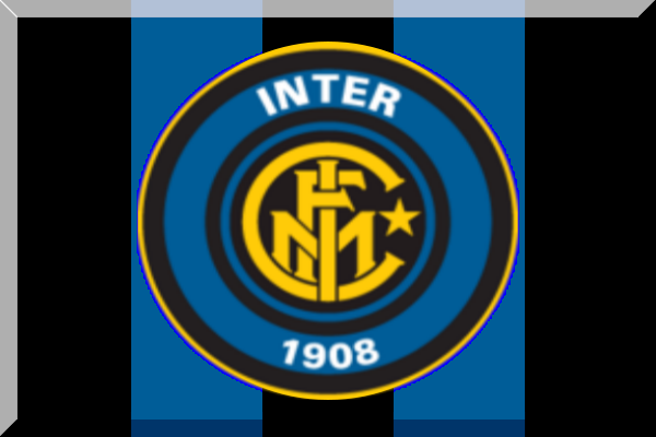 Fantasy flag resembling the colours of Inter